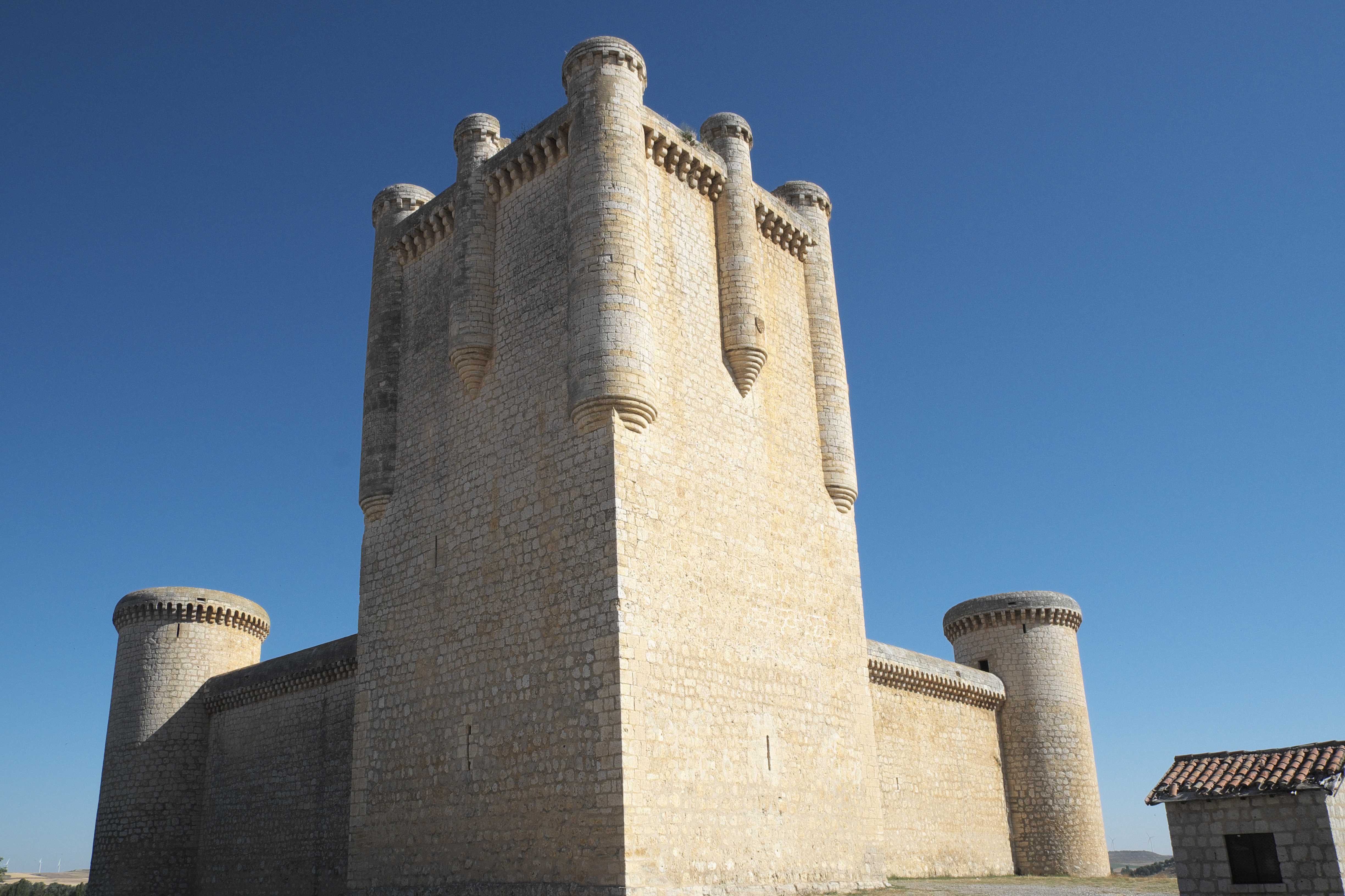 Castillo de los Enríquez, Burg von Torrelobatón in Torrelobatón in der Provinz Valladolid (Kastilien-León/Spanien)